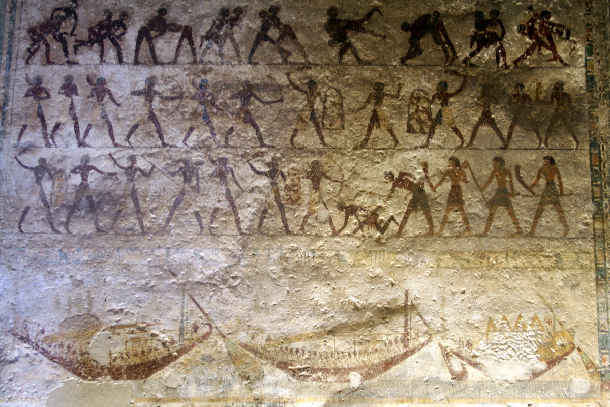 Beni Hassan, Ameny, BH2